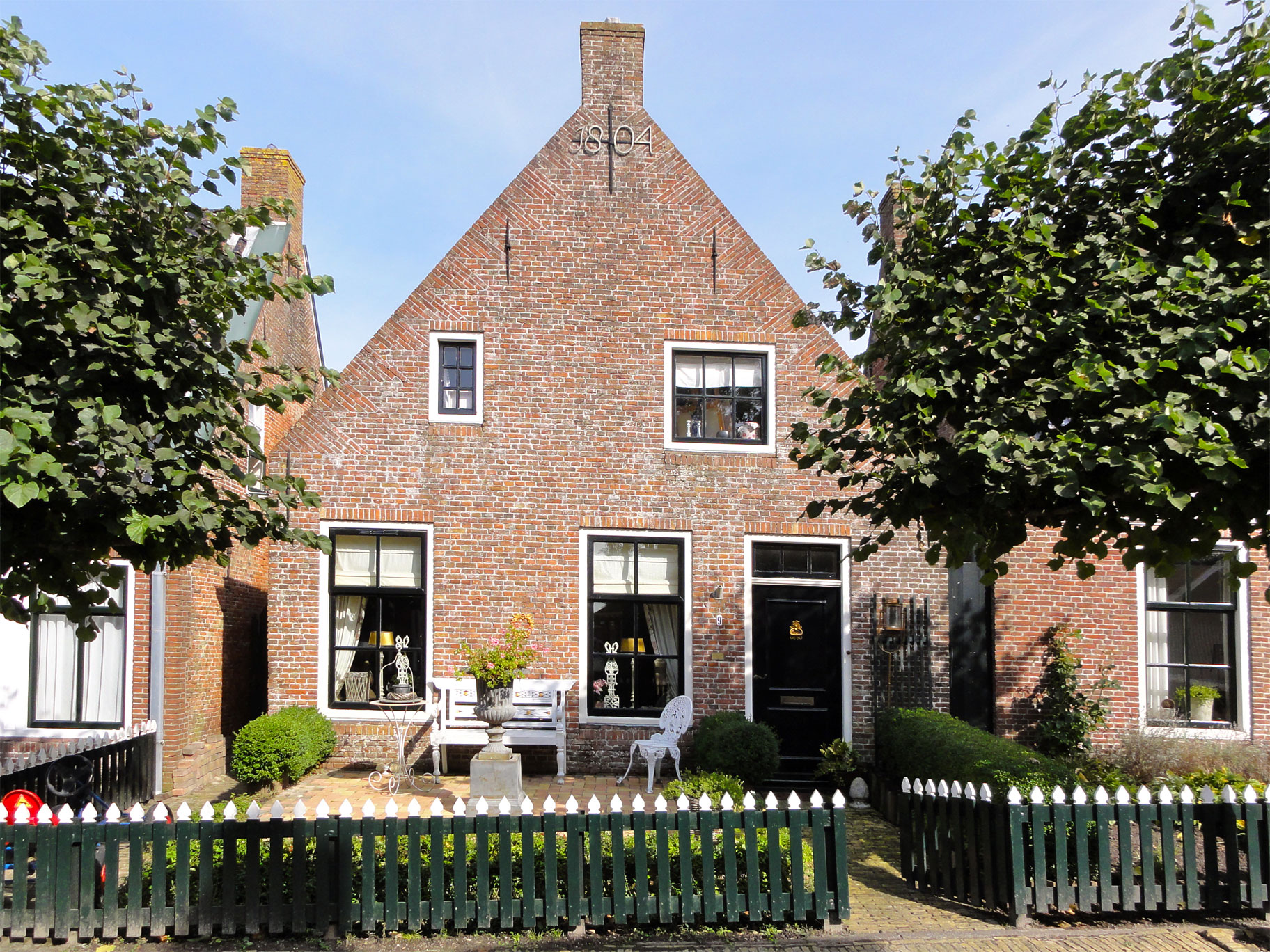 Greate Loane 9 in Ee